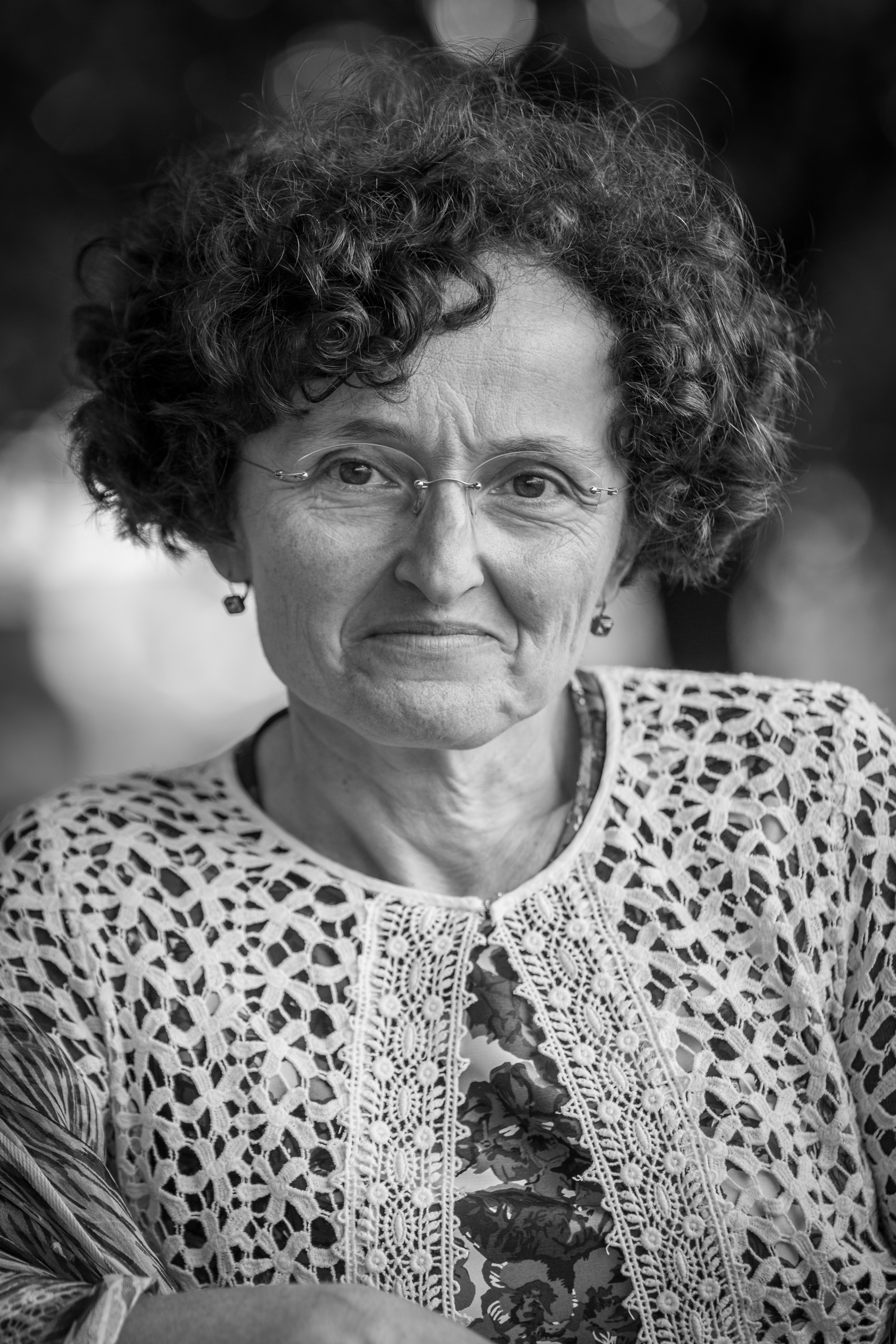 Marie-Hélène Lafon, née en 1962 à Aurillac (Cantal), est un écrivain français.